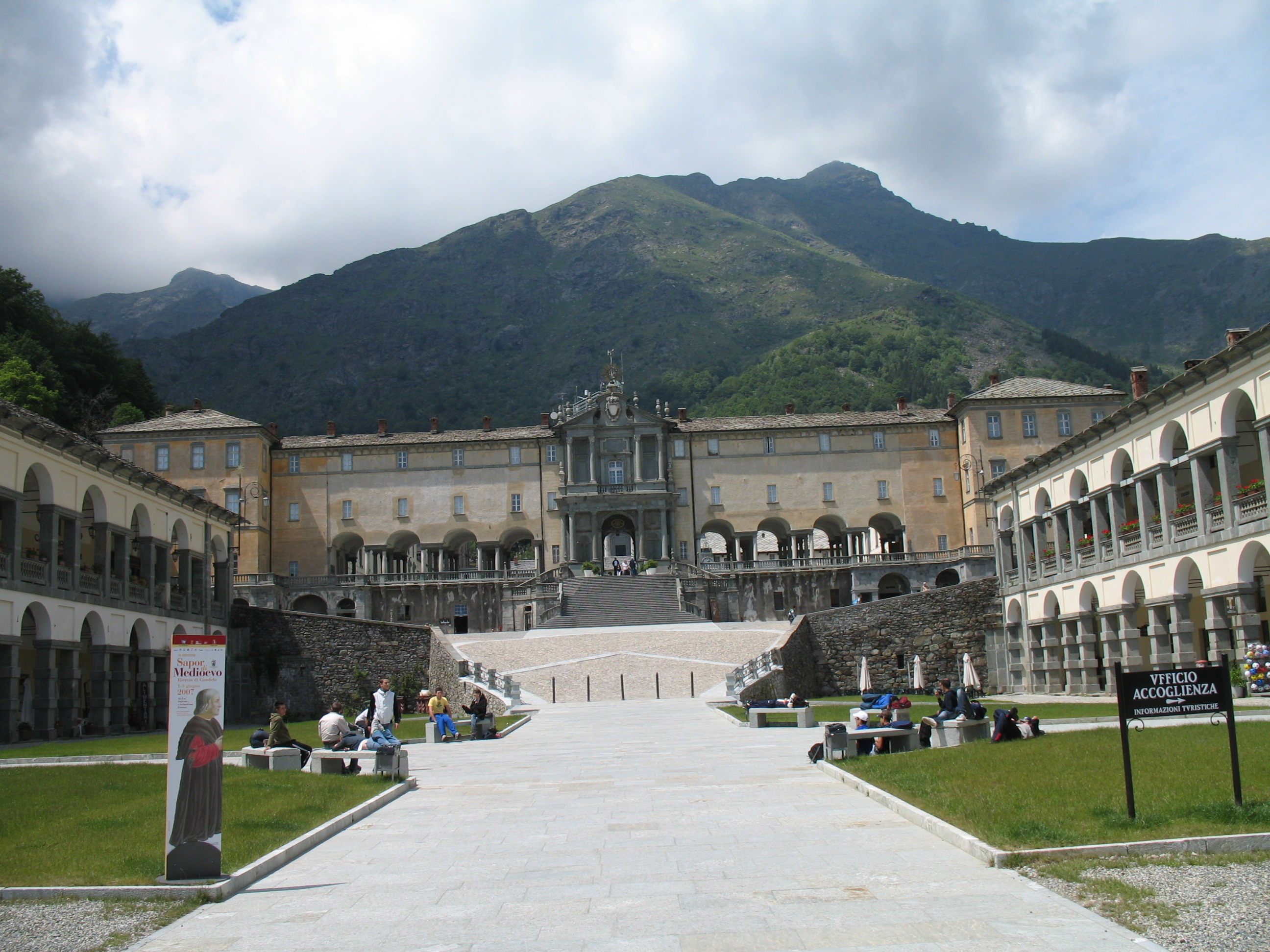 Immagine da Biella